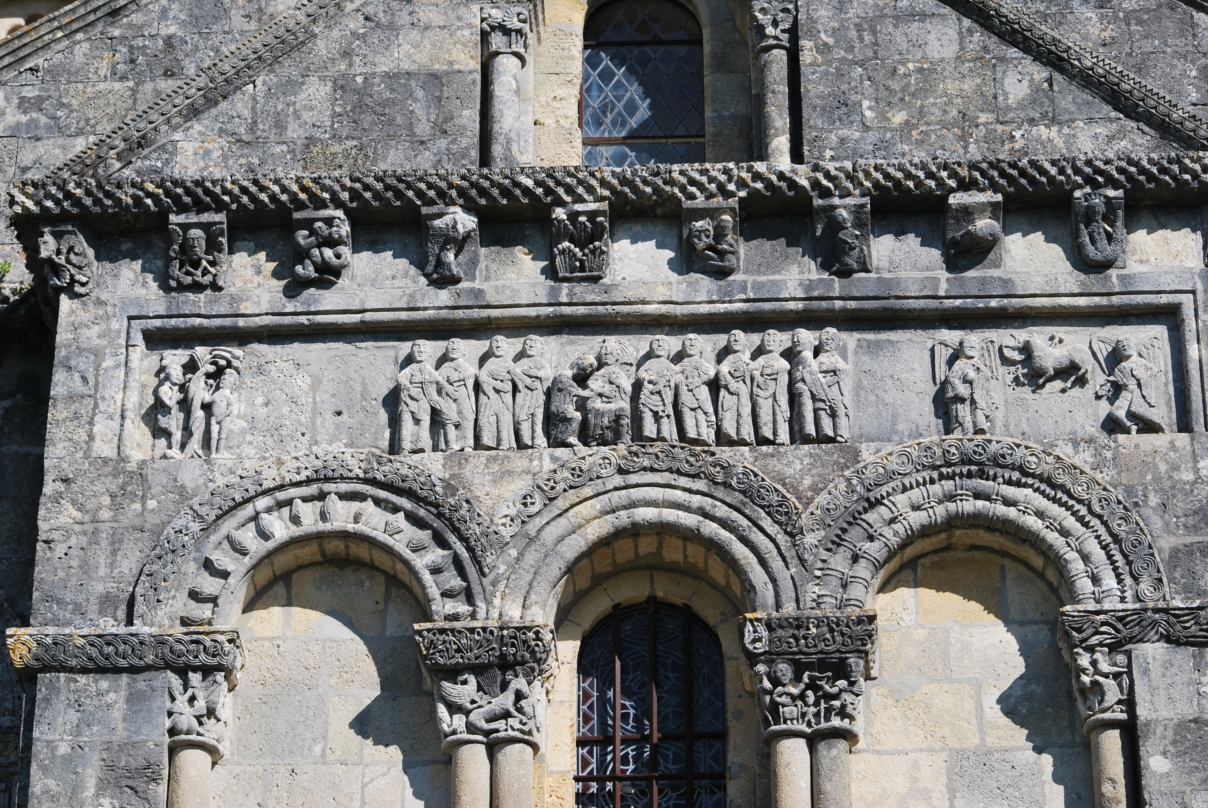 Église Saint-Pierre de Loupiac